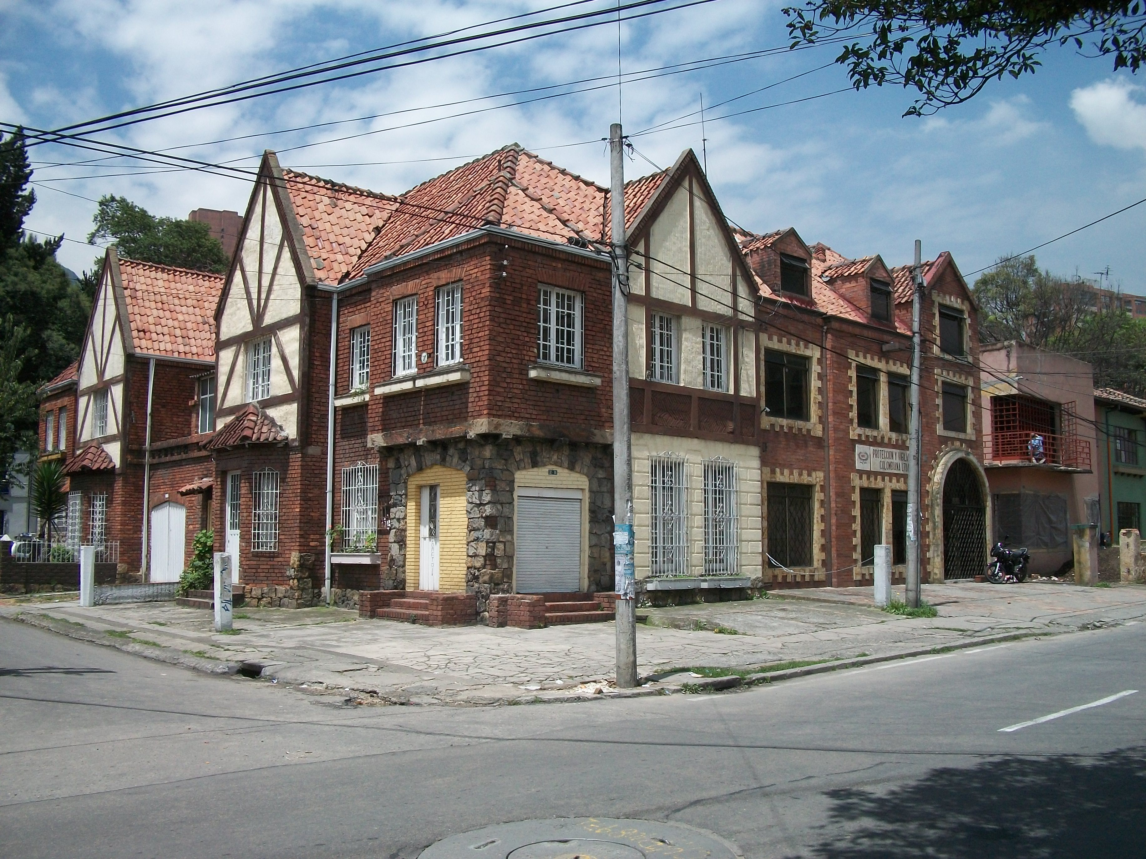 Bogotá, barrio Armenia de la localidad de Teusaquillo, Cra 16 con clle 32. Bogotá D. C.